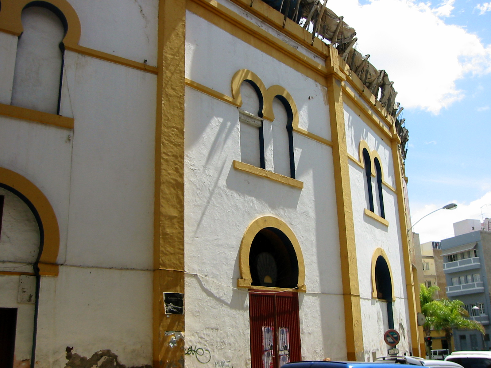 Vista de la plaza